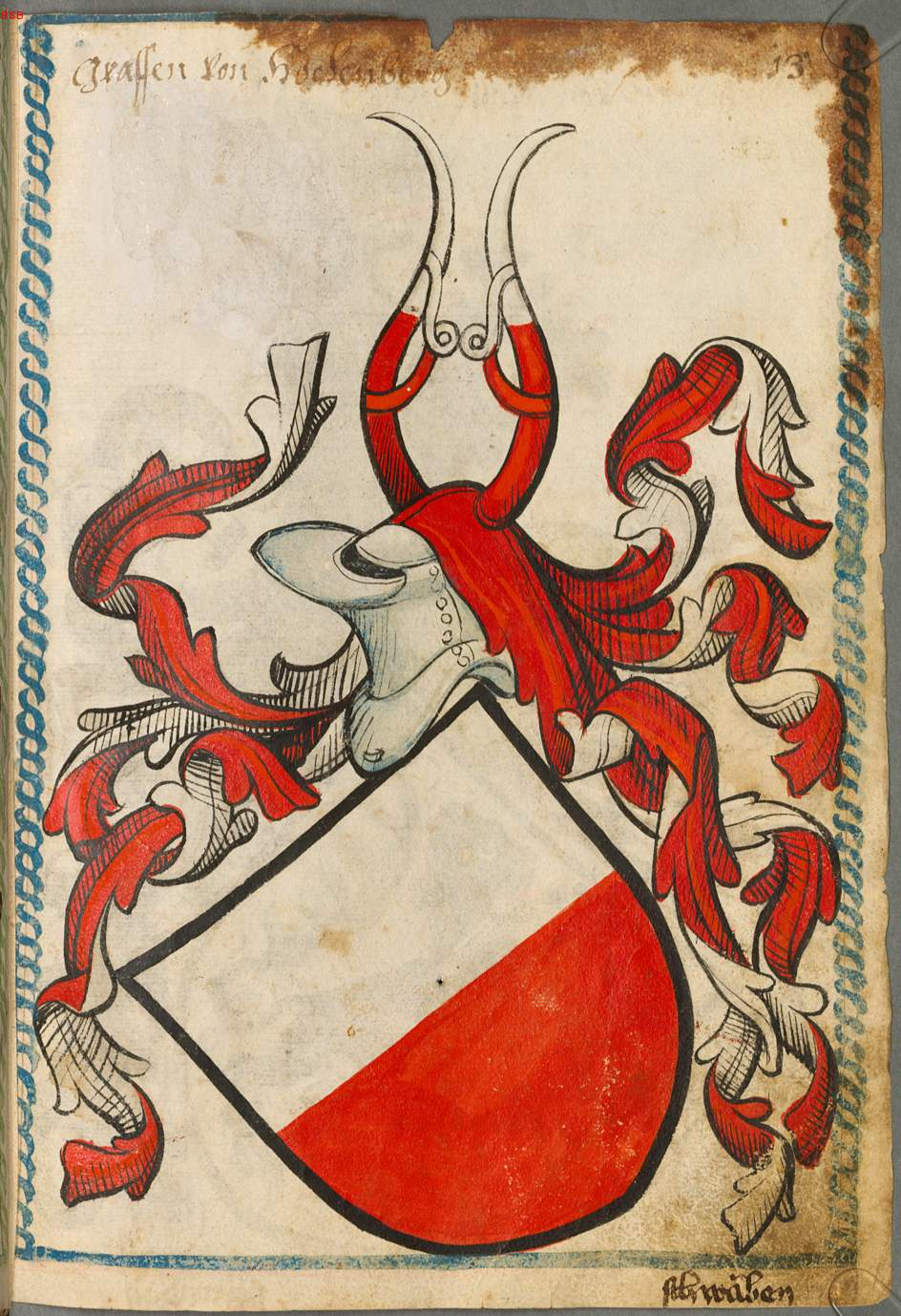 Wappen der Grafen von Hohenberg (Schwaben)